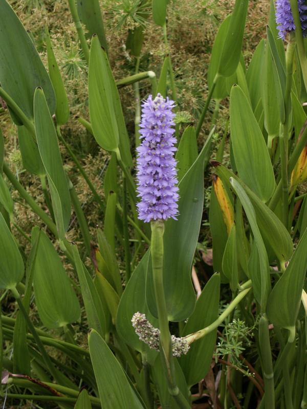 Pontederia cordata Pinecrest Gardens, Pinecrest, Miami, FL